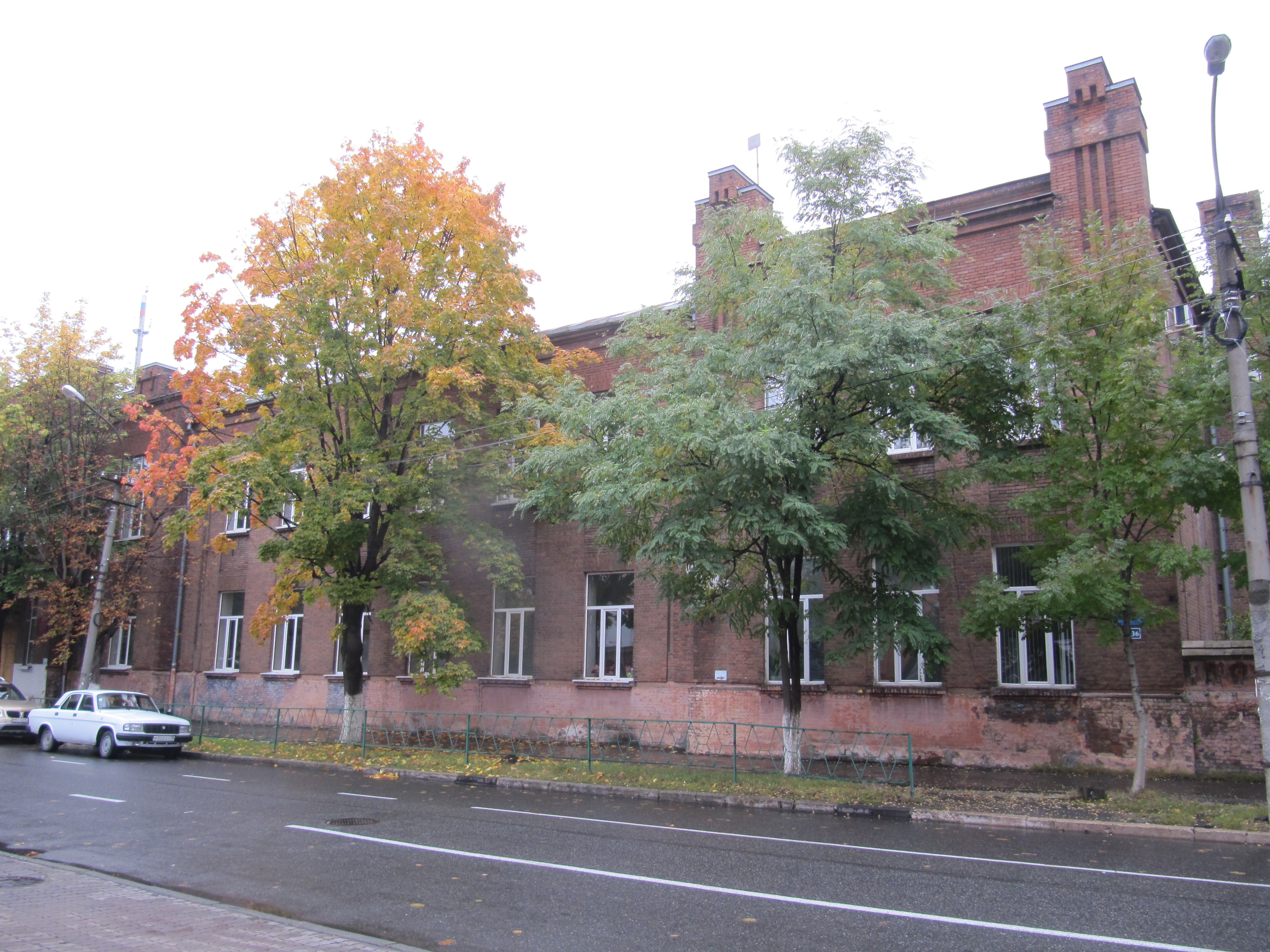 Дом №36 на улице Карла Маркса, Владикавказ